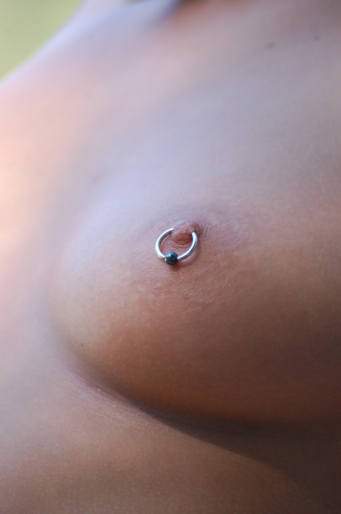 Nipple piercing